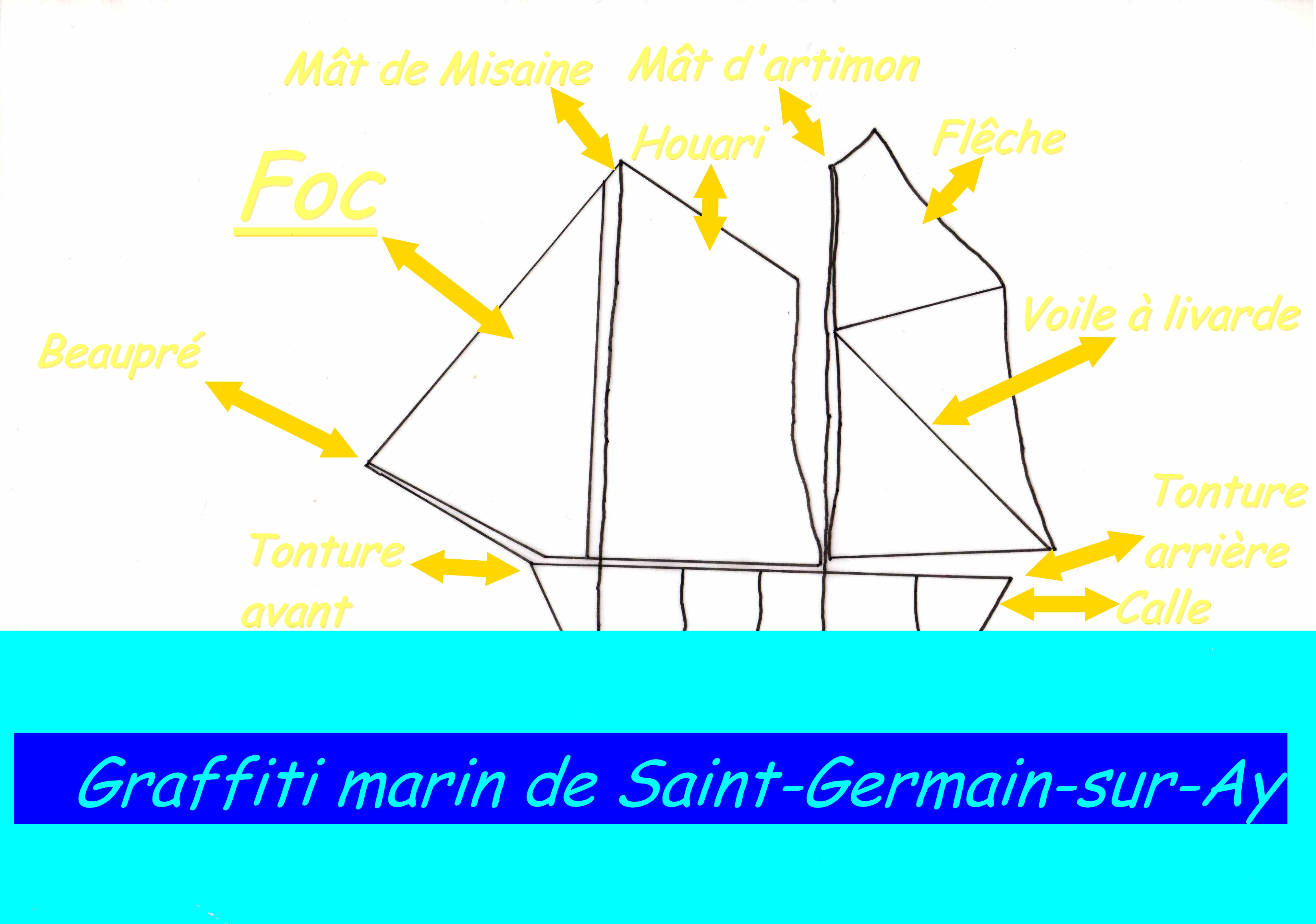 Schéma descriptif du graffiti marin situé façade ouest de l'église de Saint-Germain-sur-Ay